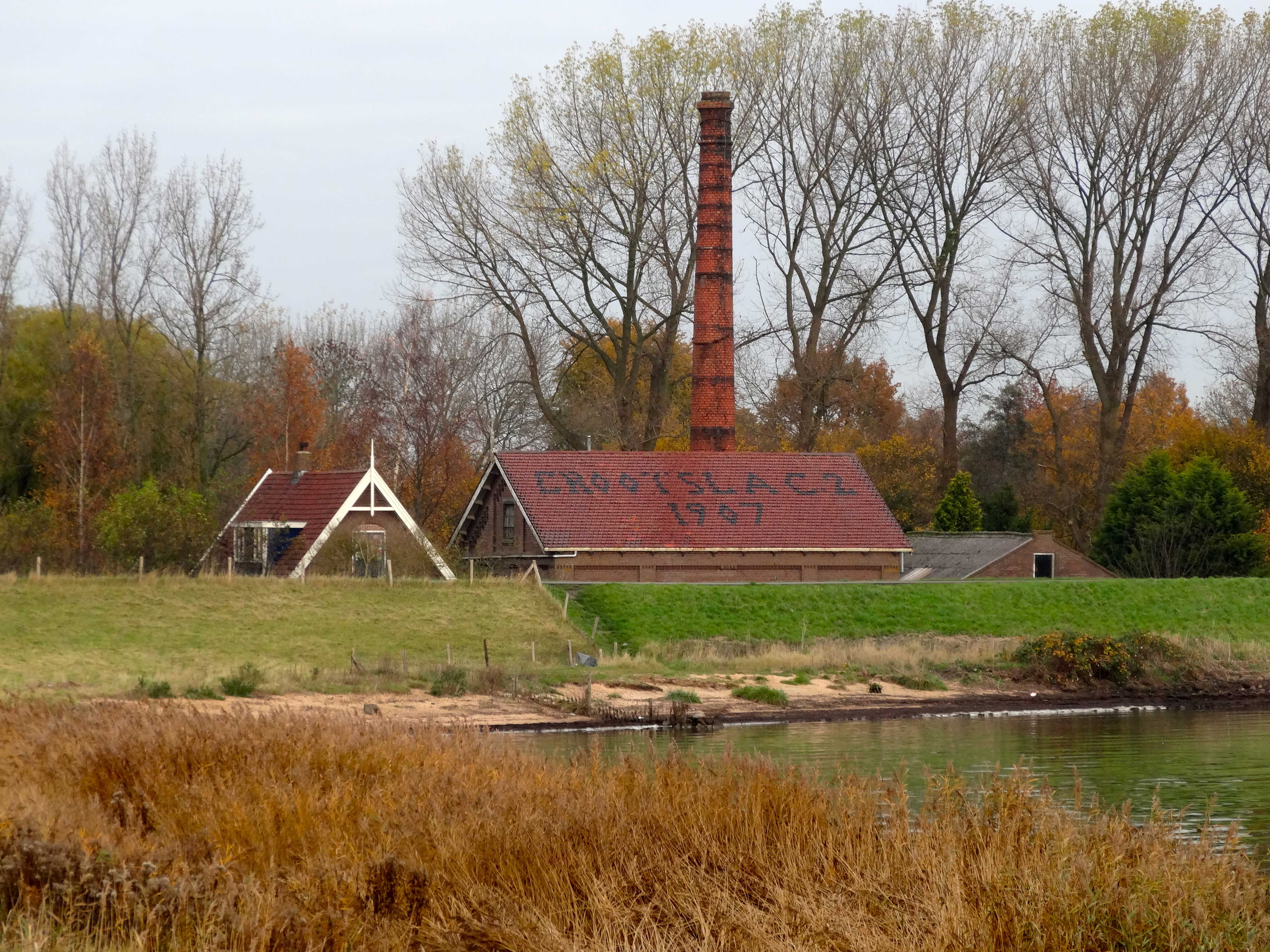 Gemaal Grootslag II in Broekerhaven/Bovenkarspel